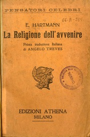 Eduard von Hartmann La Religione dell'avvenire Cover 1927 Übersetzer Angelo Treves